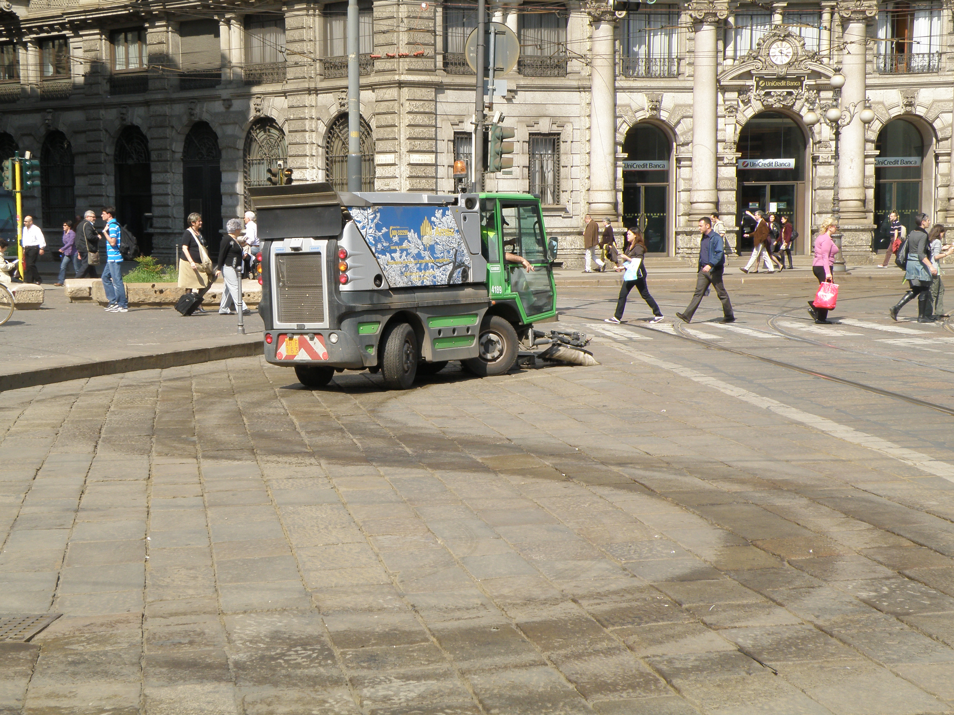 Pulizia stradale dell'AMSA in piazza Cordusio a Milano.